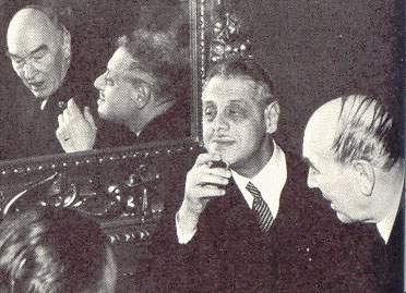 Tor Bonnier, DN:s och Expressens styrelseordförande, avnjuter en cigarr på Expressens ettårsfest